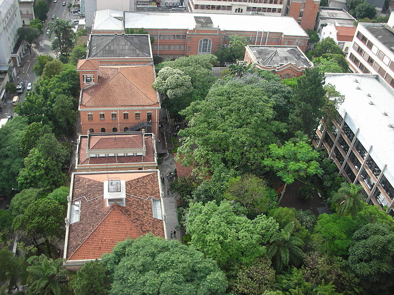 Foto aérea do Mackenzie